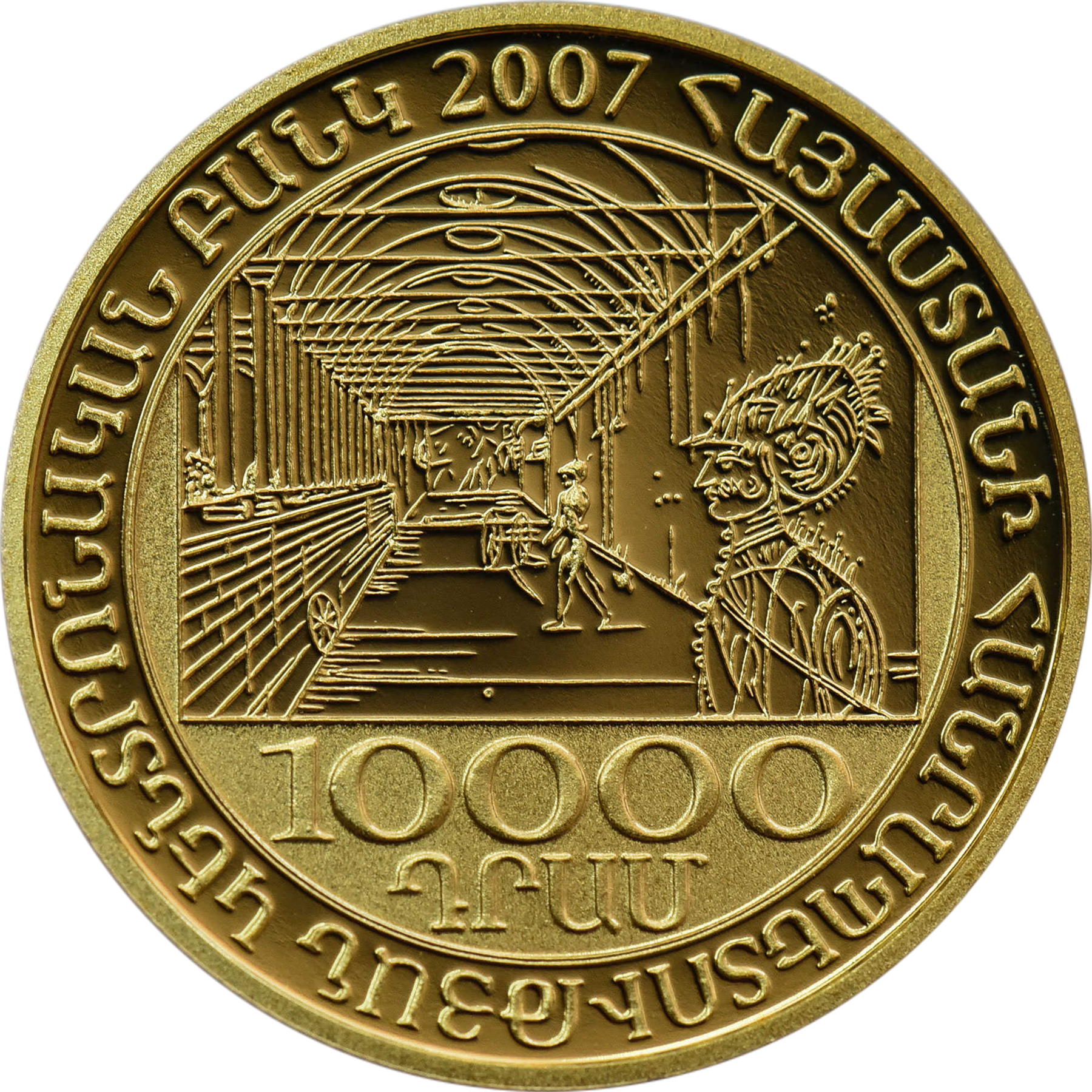 Памятная монета Армении 2007 года "Жан Гарзу" - 10000 драм - золото 900